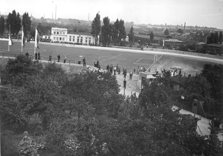 Zentralbild-Rösener Zi-Zu. 3.9.1952 Einweihung des Heinrich-Germer-Stadions in Magdeburg. Heinrich Germer, der leider zu früh verstorbene Lehrer des Volkes, wurde von den Magdeburgern geehrt, indem sie dem neuen Sportplatz am Königsweg in Sudenburg seinen Namen gaben. UBz, Das Heinrich-Germer-Stadion.